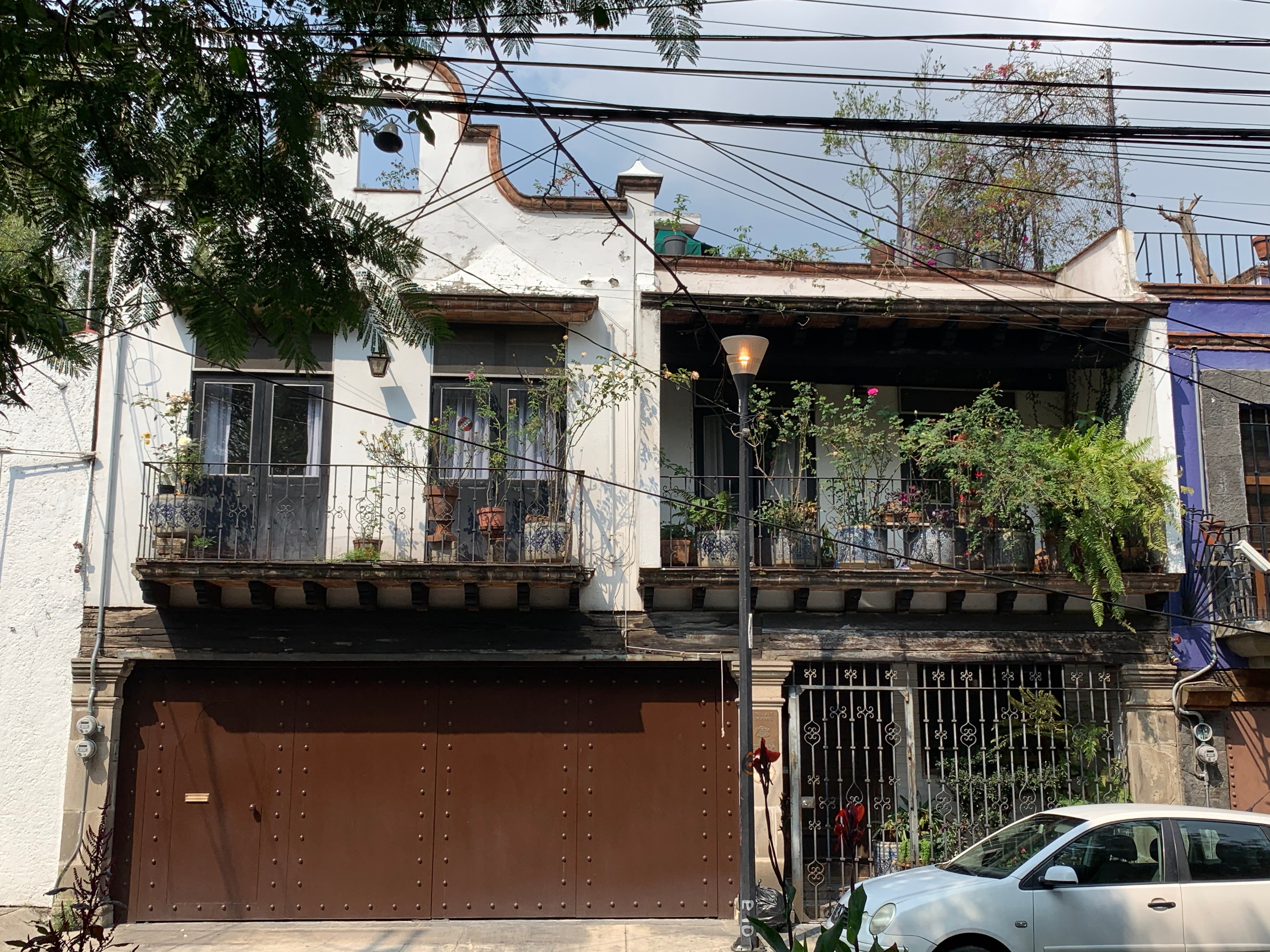 En el centro de la colonia Chimalistac, en Coyoacán, se encuentra esta casa que sirve como sede del Consulado Honorífico de Letonia en México.